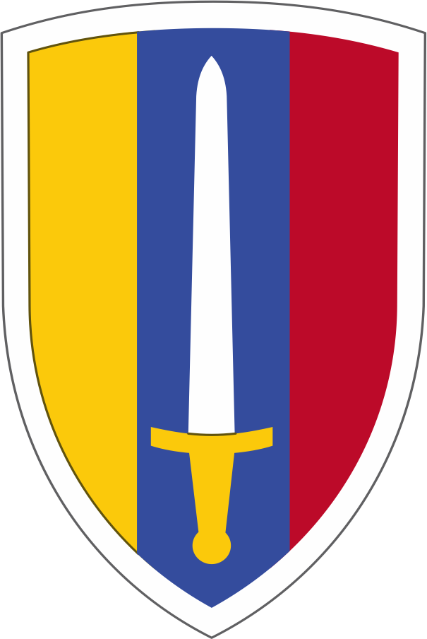 주월 미국 육군의 문장이자 소속군인의 인식표.